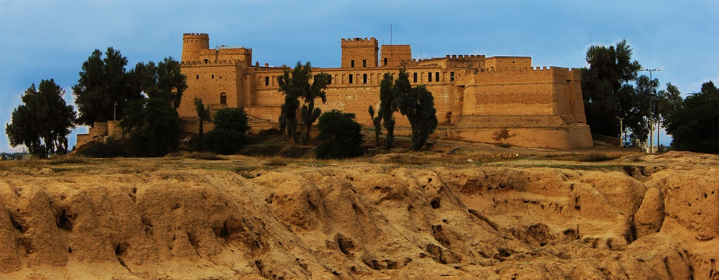 قلعه شوش